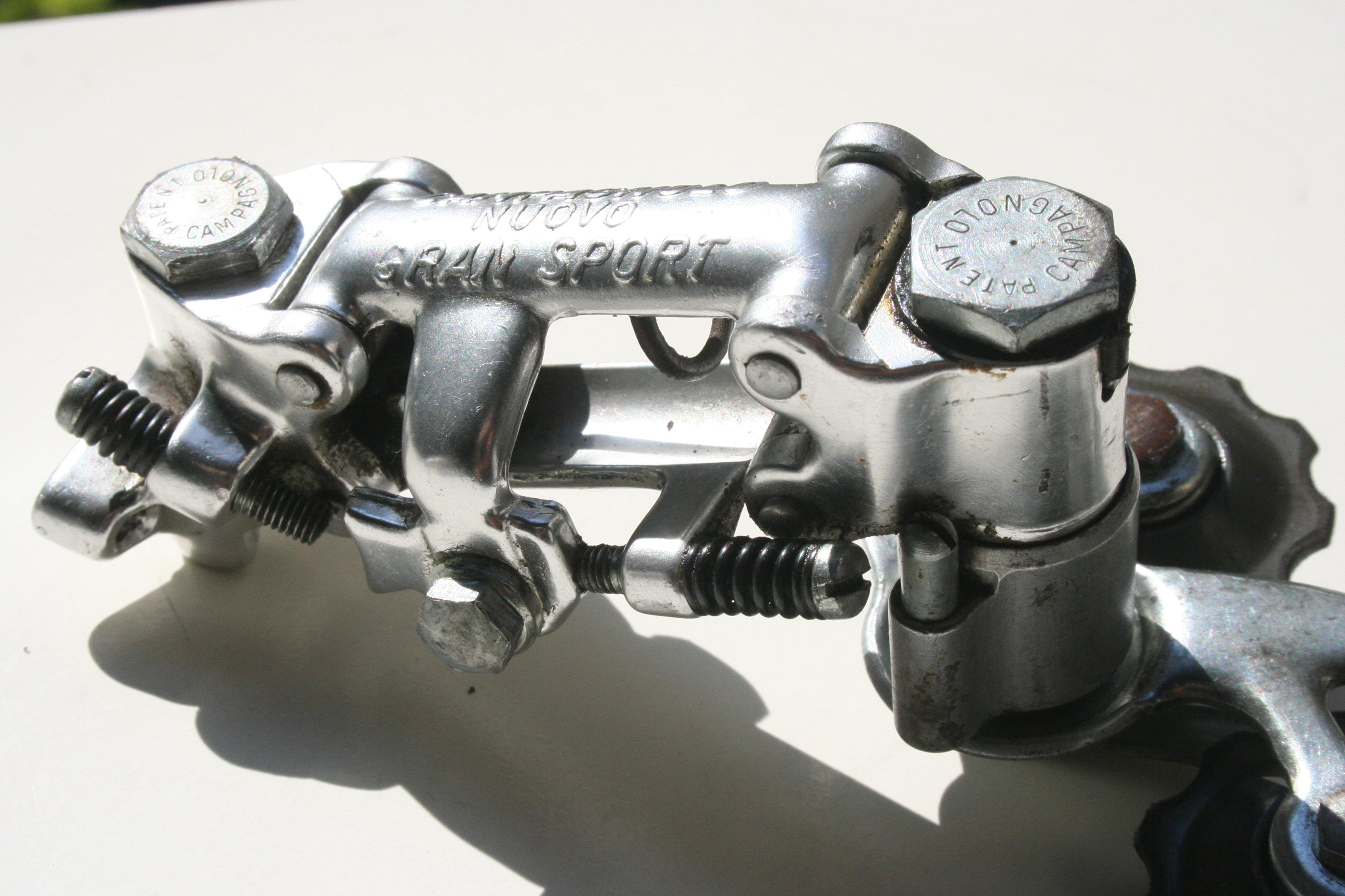 Camapagnolo Schaltwerk mit Justier-Schrauben zur Begrenzung des Schaltweges bis zum kleinsten und größten Ritzel.